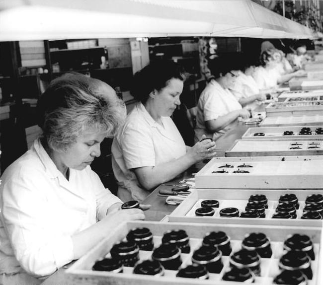 Görlitz, Pentacon, polnische Gastarbeiterinnen ADN-ZB Häßler 30.6.1975 Görlitz-Zgorzelec: Partnerstädte an der Oder-Neiße-Friedensgrenze (zum 25. Jahrestag des Abkommens) Görlitz: Gemeinsam mit ihren Kollegen aus der DDR sichern polnische Werktätige im VEB Pentacon, Feinoptisches Werk Görlitz, gute Wettbewerbsergebnisse. Zu ihnen gehören Irena Piseuch (l) und Ruta Ratajaczak, die an der Montage von Oreston-Objektiven arbeiten. Anteilmäßig zum Staatsplan konnte das erste halbjahr mit 52,5 Prozent erfüllt werden.